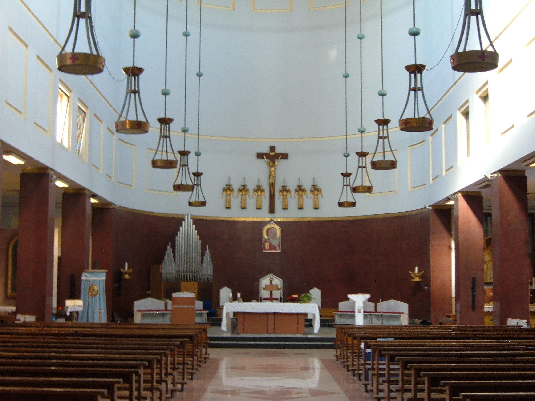 Chiesa di San Pio V, a Roma, nel quartiere Aurelio. Interno.